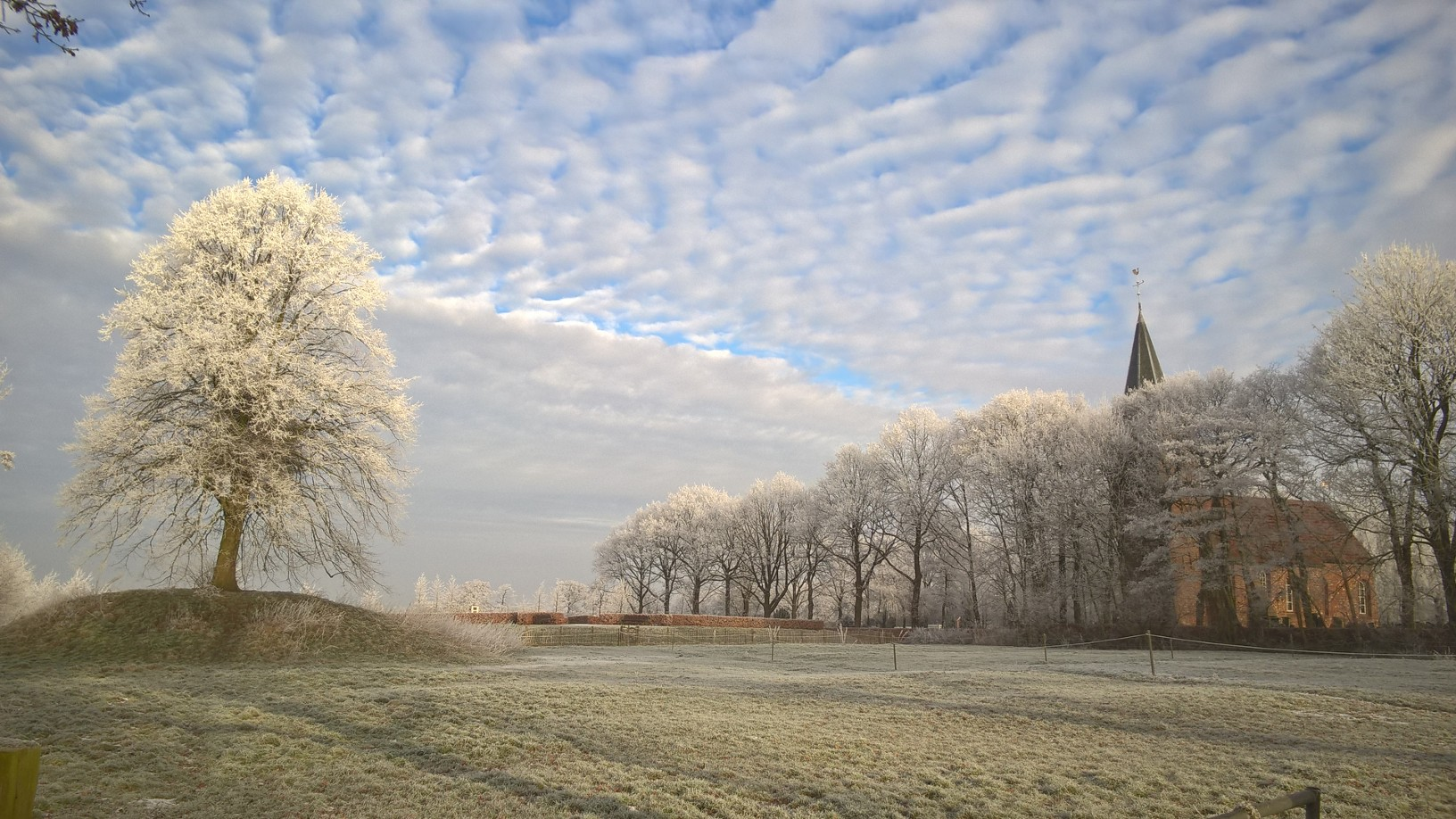 Bult van Marum met rechts in beeld de Hervormde Kerk van Marum